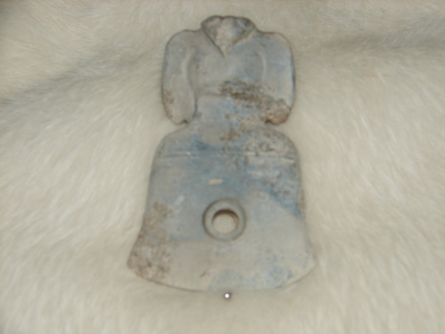 中文（台灣）: 器名：玉梟斧鋤器 器別：生坑 紋飾：立體 泌色：無﹝鐵灰色﹞ 朝代：三星堆文化 礦物學名：岫岩玉﹝青黄玉﹞ 三星堆文化-年代約4800至2200年。 三星堆文化-小件配飾品.有數百種的造形.c形龍斧鋤器.猪龍斧鋤器.﹝玉梟.玉鷹斧鋤器﹞.面具.異形獸斧鋤器.玉蟬複合體等。 此器質化晶變‧次晶增生未受人工拋光打磨、 保留原有土咬風化.器上巧雕 ﹝日.月﹞二字銘文、生坑未盤玩，三面立體﹝肖生﹞造形特別‧曲線流暢.雕工傳神‧創意佳。 ﹝藝術品﹞